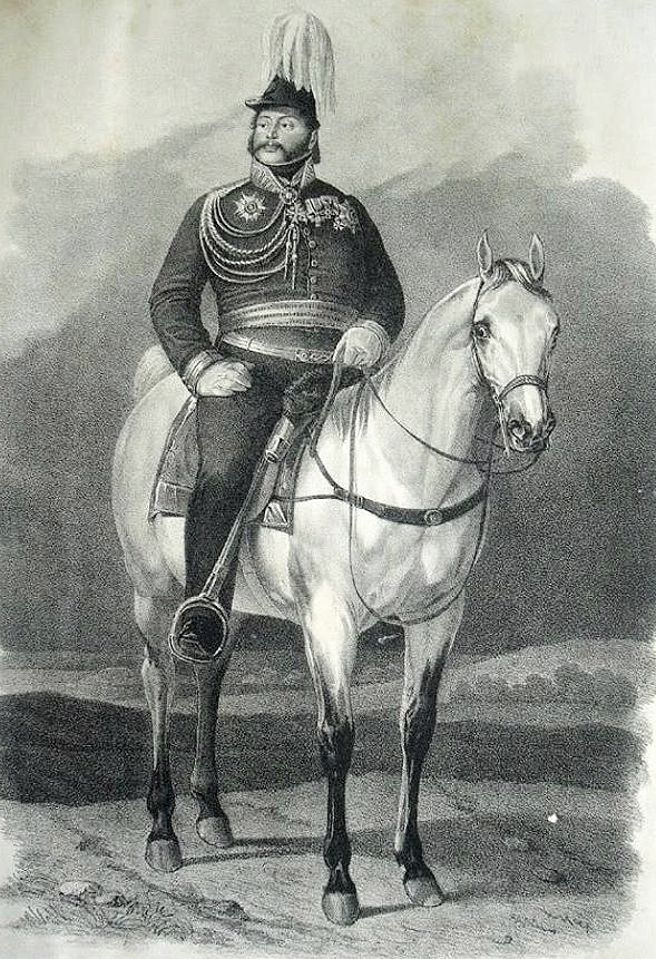 Dominik Constantin, 4. Fürst zu Löwenstein-Wertheim-Rochefort als Generalmajor und Generaladjudant des Königs von Bayern